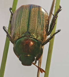 Mimela junii (Duftschmid, 1805) Comersee, 28.06.06, Felix Riegel